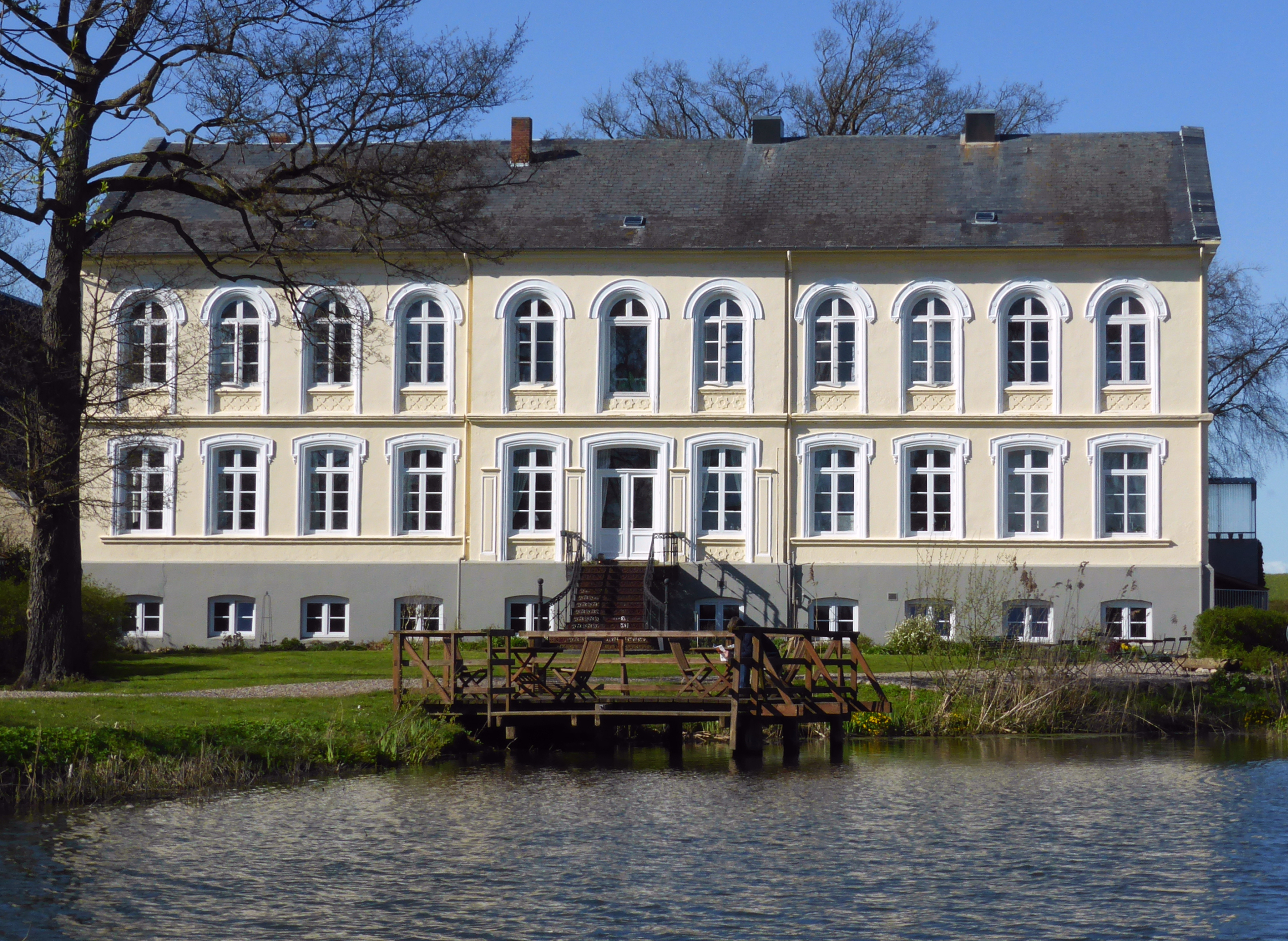 Oestergaard Ortsteil von Steinberg an der Ostsee, prachtvolles Herrenhaus aus dem Jahr 1856 - Gut Östergaard bereits im 16. Jh in Angeln erwähnt - Foto 2014 Wolfgang Pehlemann P1060229